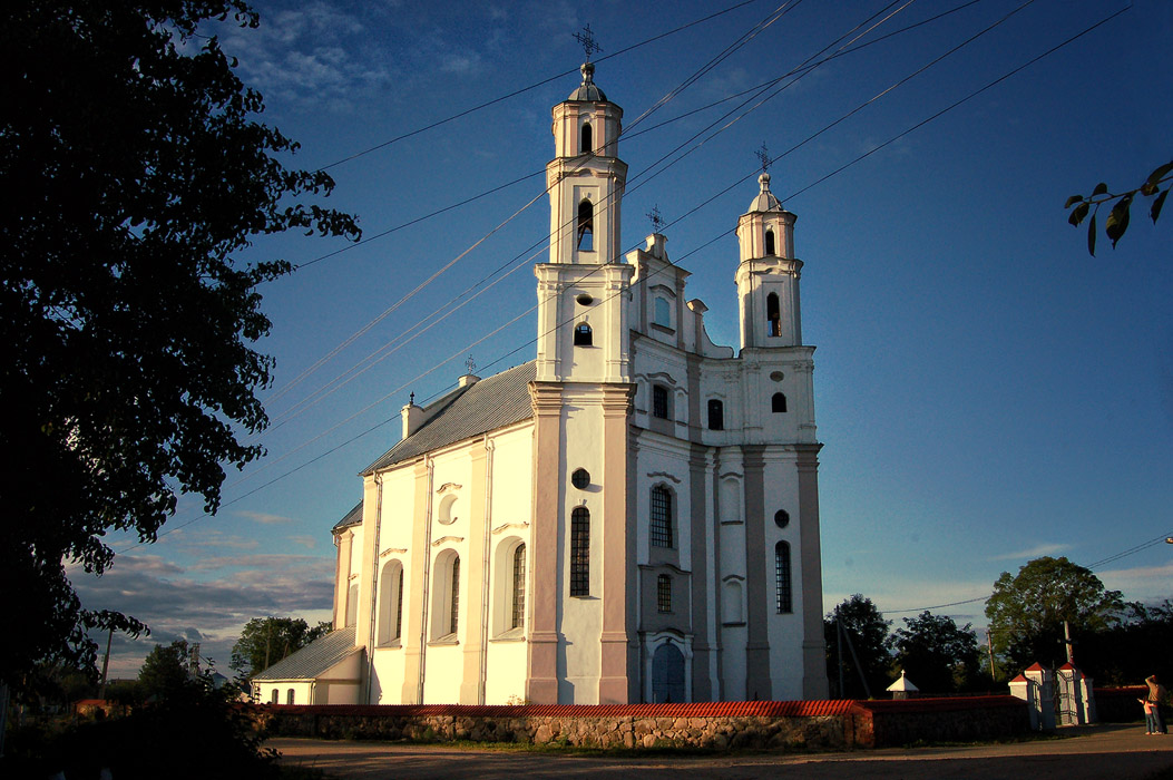 Міхайлаўскі касьцёл This is a photo of Belarusian heritage monument. Reference number: 212Г000839 ( WLM)